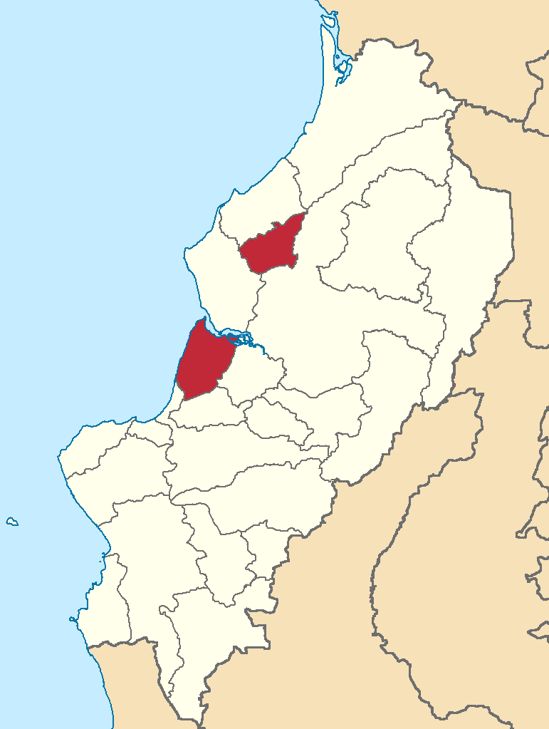 Mapa localizador del cantón en Manabí, Ecuador